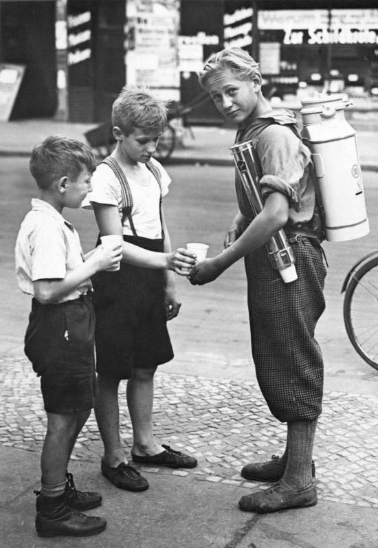 Berlin, Limonadenverkäufer Scherl: Berlin, 1931 Der fliegende Eislimonadenverkäufer 24857-31